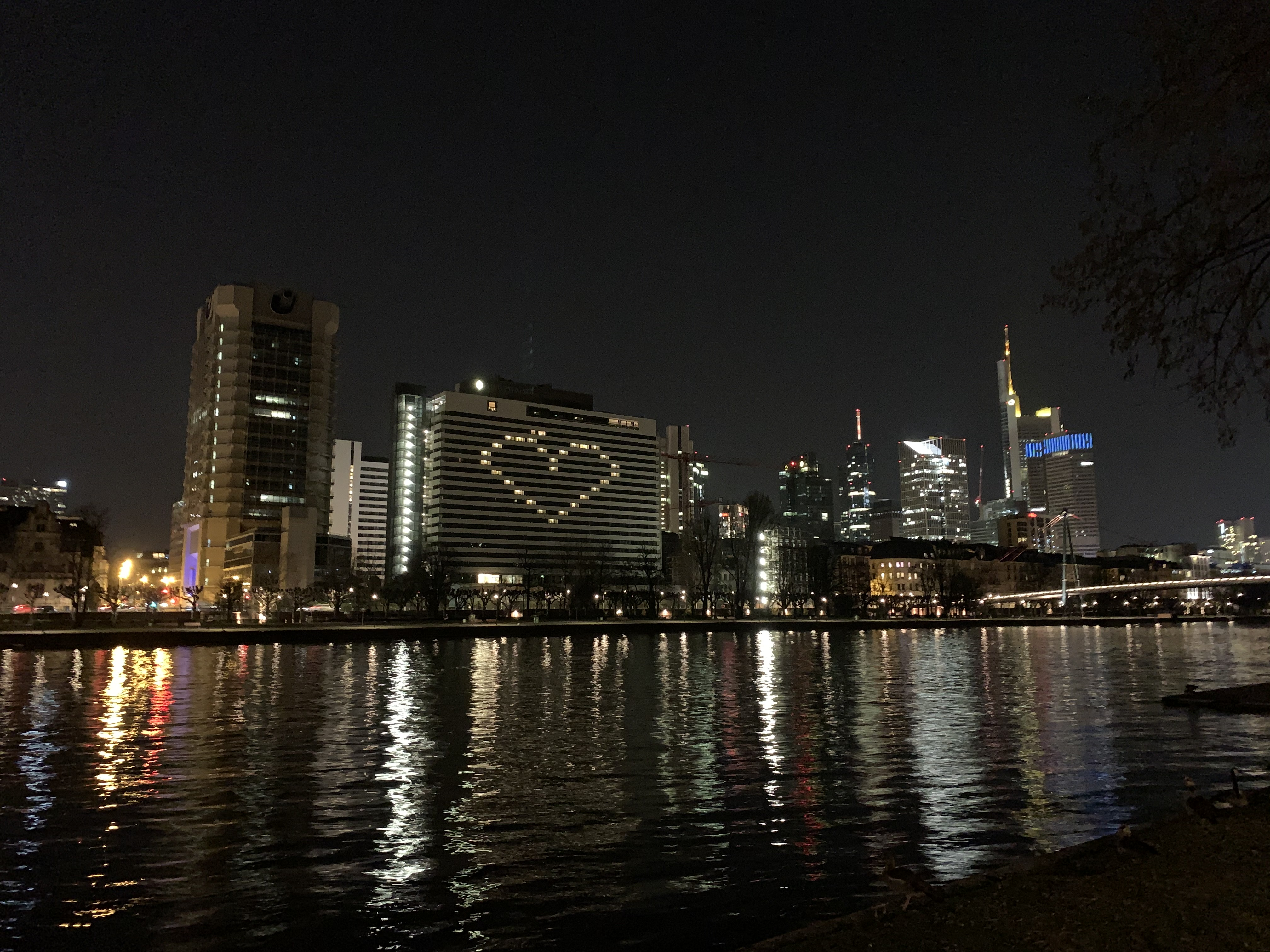 Weltweite #LightsofLove Initiative der IHG während der Coronavirus-Pandemie im März 2020. Hier: InterContinental Frankfurt am Main